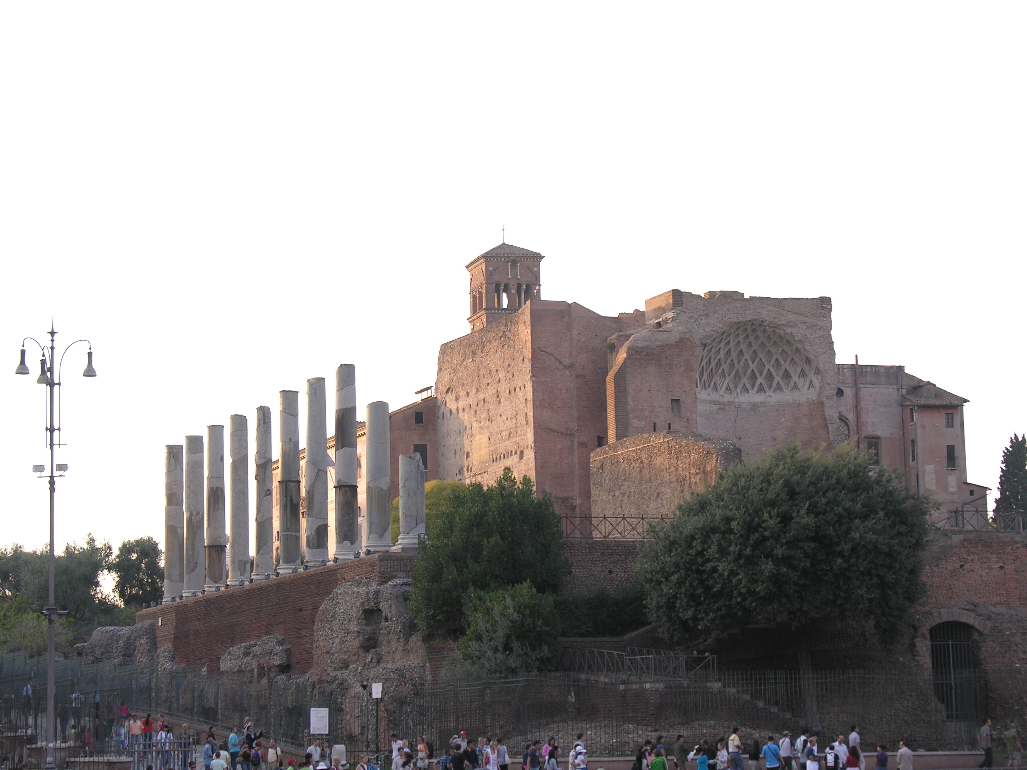 Description: Temple de venus et Rome, Rome Source: oeuvre personnelle Date: 30 septembre 2006 Auteur: Réjean Langevin Permission: libre